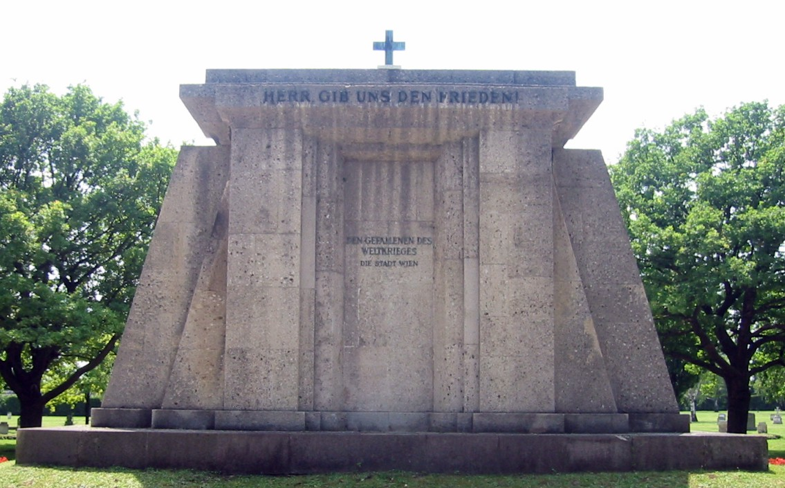 Wiener Zentralfriedhof, Gedenkstätte 1.Weltkrieg Vorderansicht